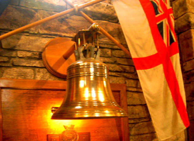 Gedenkstätte mit Schiffsglocke des Schlachtschiffes Royal Oak im Magnusdom von Kirkwall, Mainland, Orkney